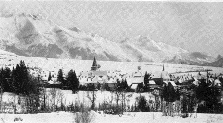 Mens et les montagnes du Trièves (Isère). L’Obiou (2.793 m.) et le Grand-Ferrand (2.761 m.). Extrait de : S. LORTSCH , Félix Neff, l'Apôtre des Hautes-Alpes , Biographie extraite de ses Lettres, Nouvelle Société d’Editions de Toulouse, Dieulefit (Drôme), 1933.